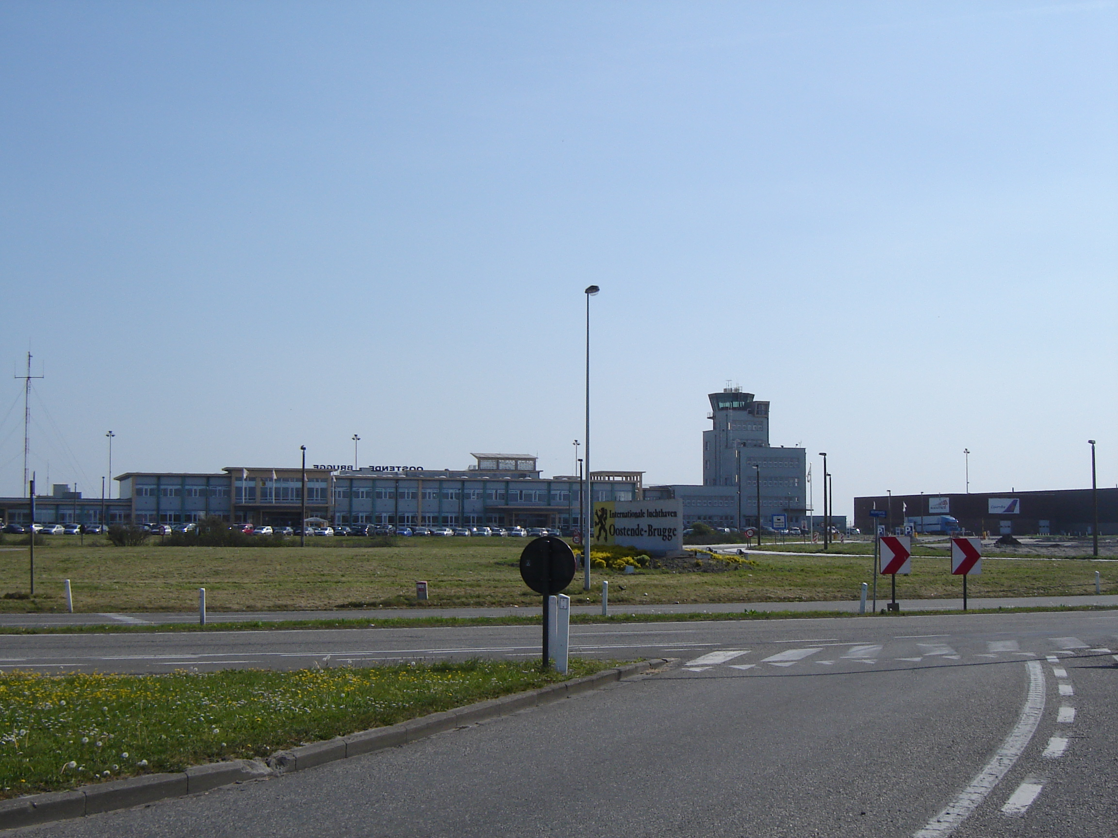 Luchthavengebouw Luchthaven Oostende International Airport of Ostend, West Flanders, Belgium